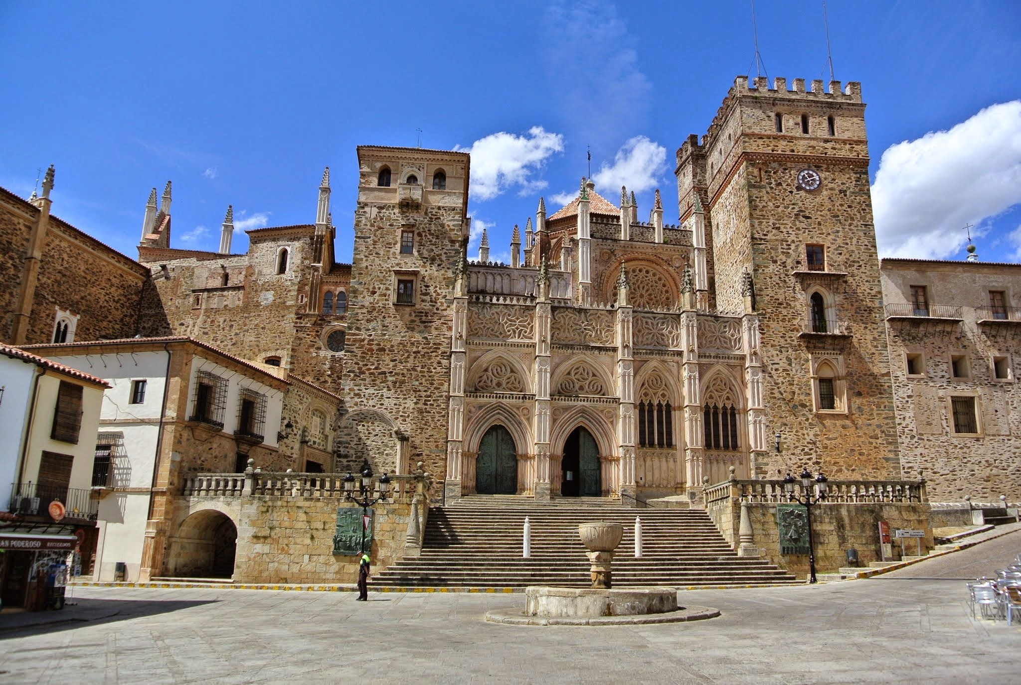 Guadalupe, Cáceres, Spain